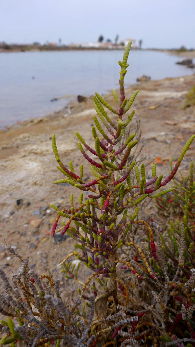 Sosa alacranera (Sarcocornia fruticosa) en las salinas de Marchamalo, La Manga del Mar Menor, Cartagena, España.